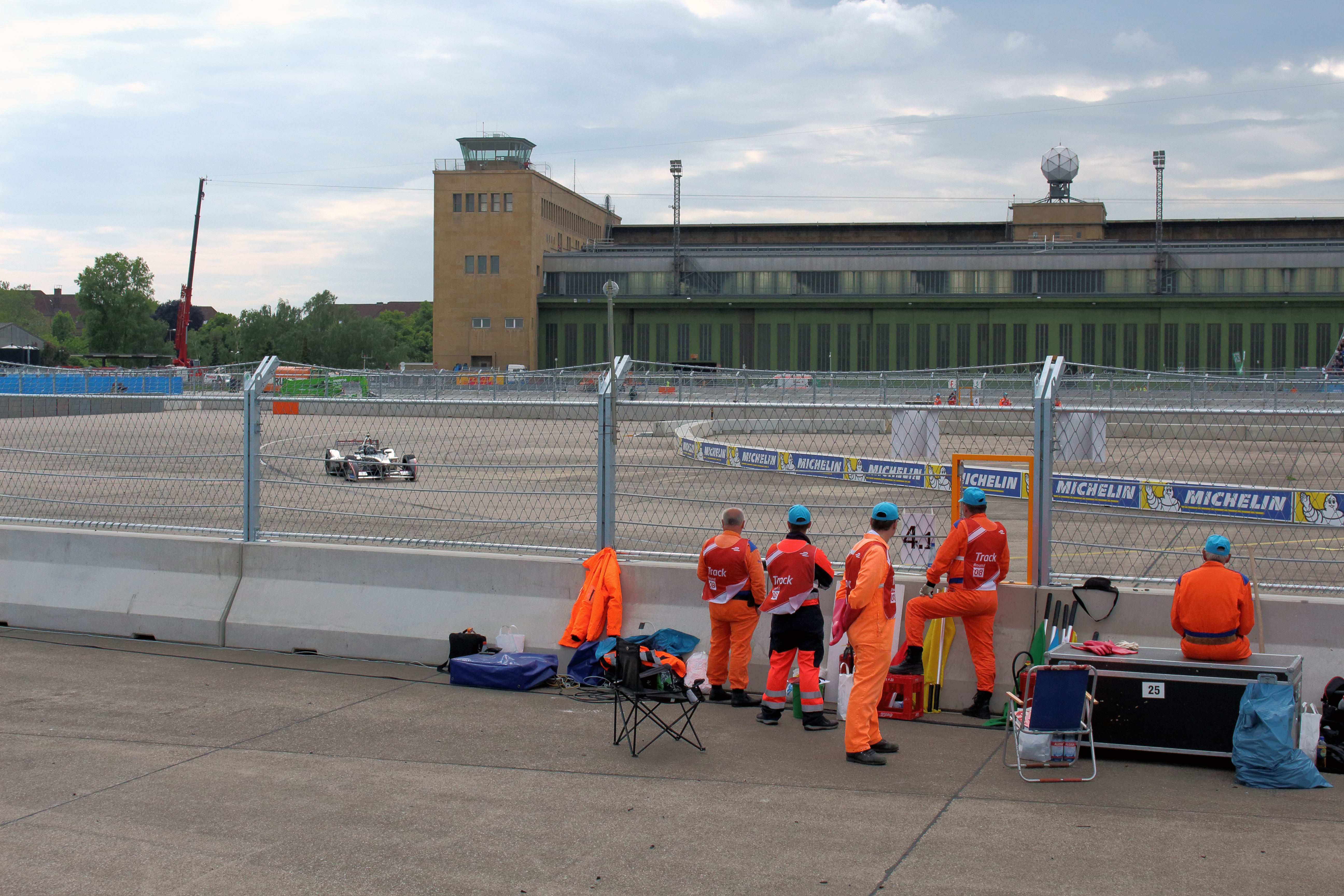 Formel E in Berlin-Tempelhof